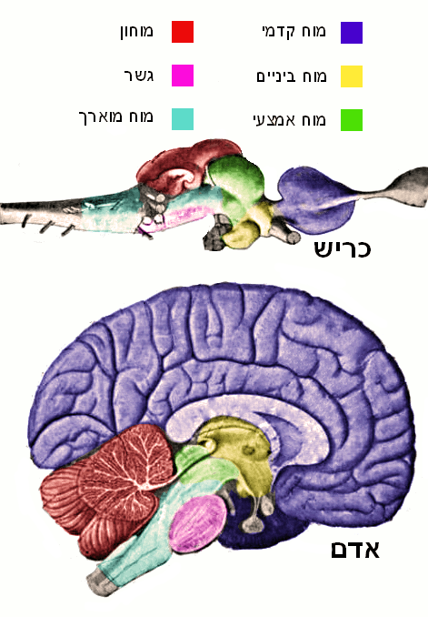 השוואת האזורים העיקריים של מוחות של כריש ובן אדם (שני המוחות לא בקנה מידה)